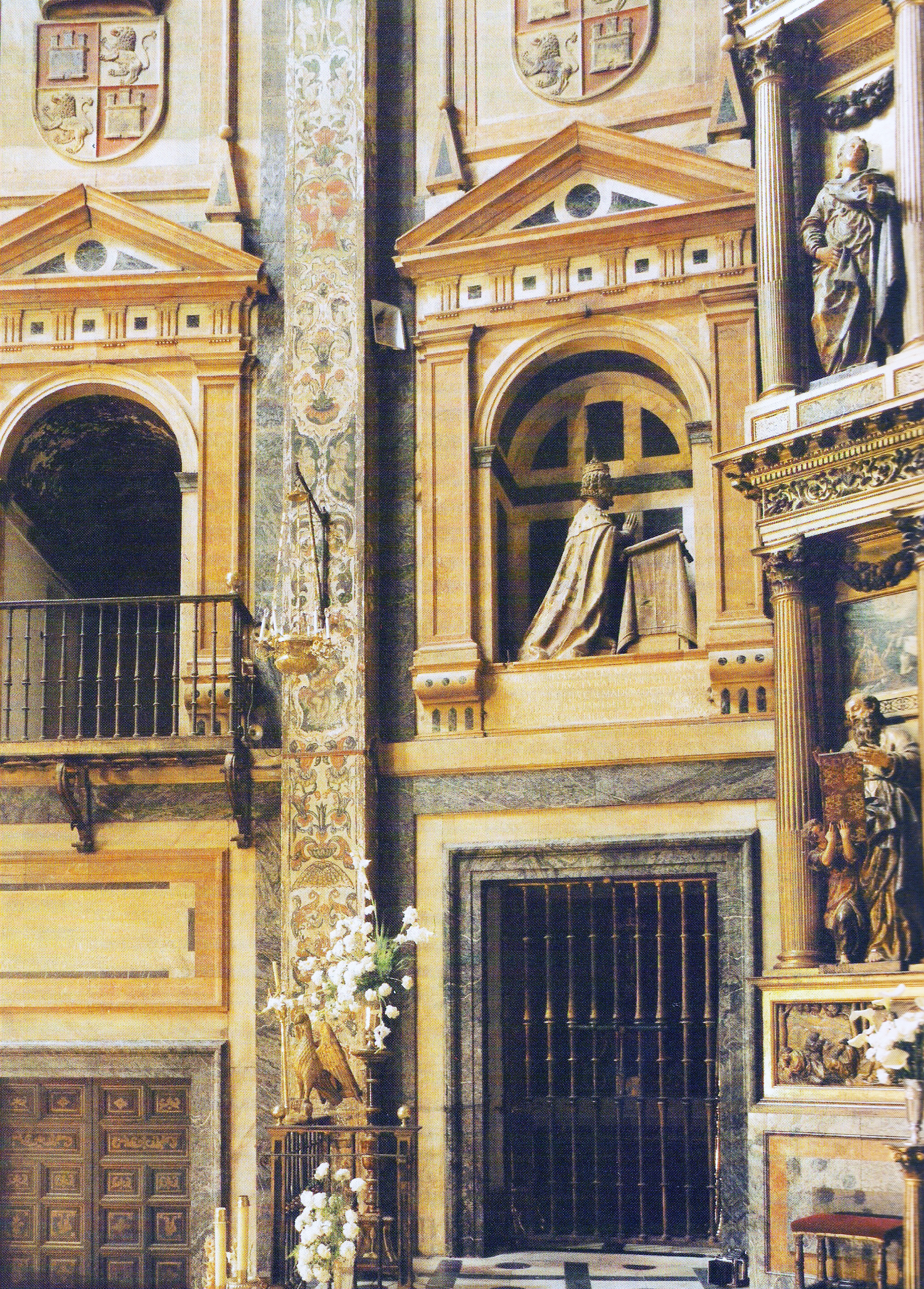 Sepulcro del rey Enrique IV de Castilla (1425-1474), que fue hijo del rey Juan II de Castilla y de la reina María de Aragón, en la iglesia del Real Monasterio de Santa María de Guadalupe, provincia de Cáceres, (España).